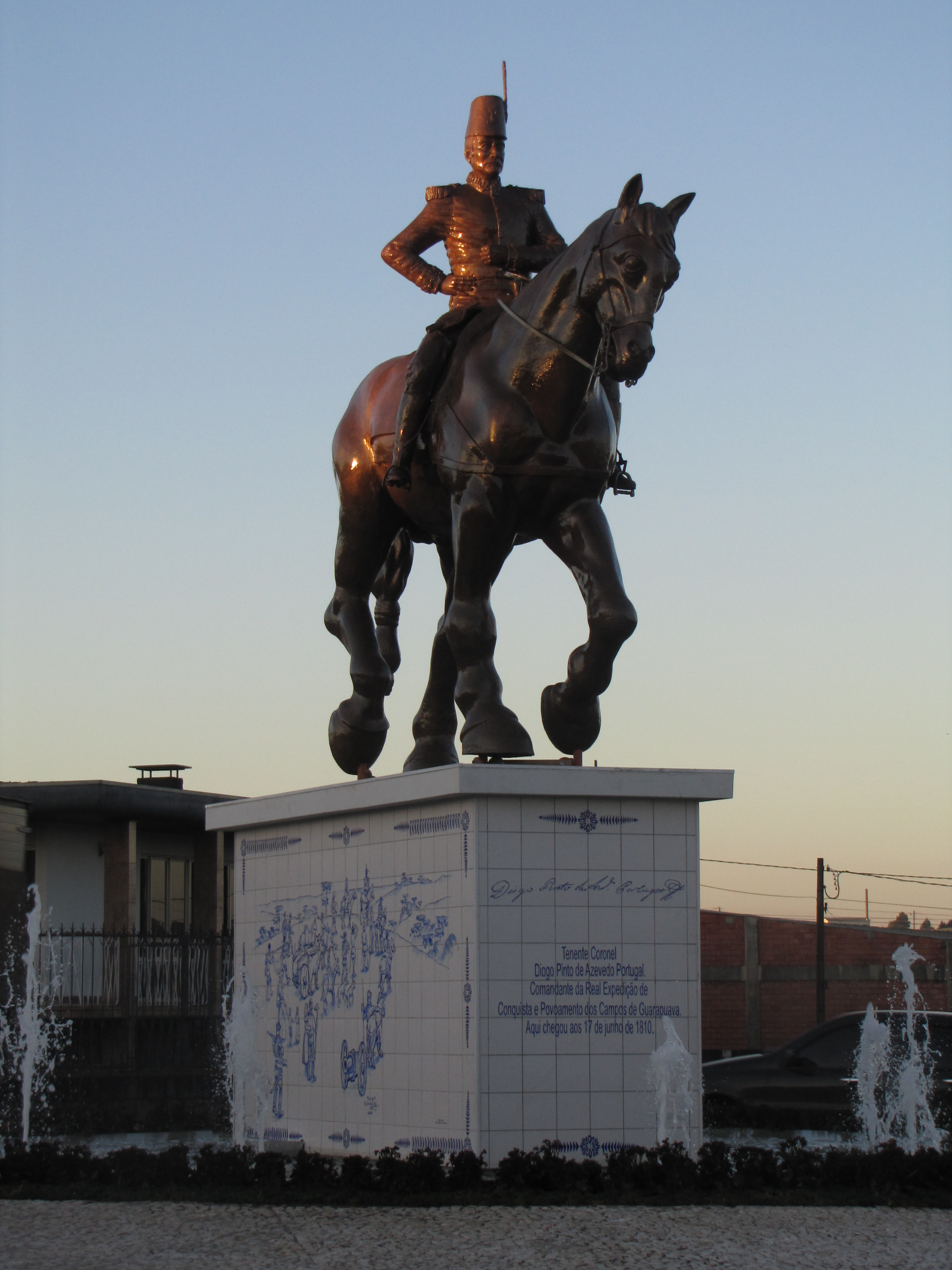 Estatua do Tenente Coronel Diogo Pinto de Azevedo Portugal